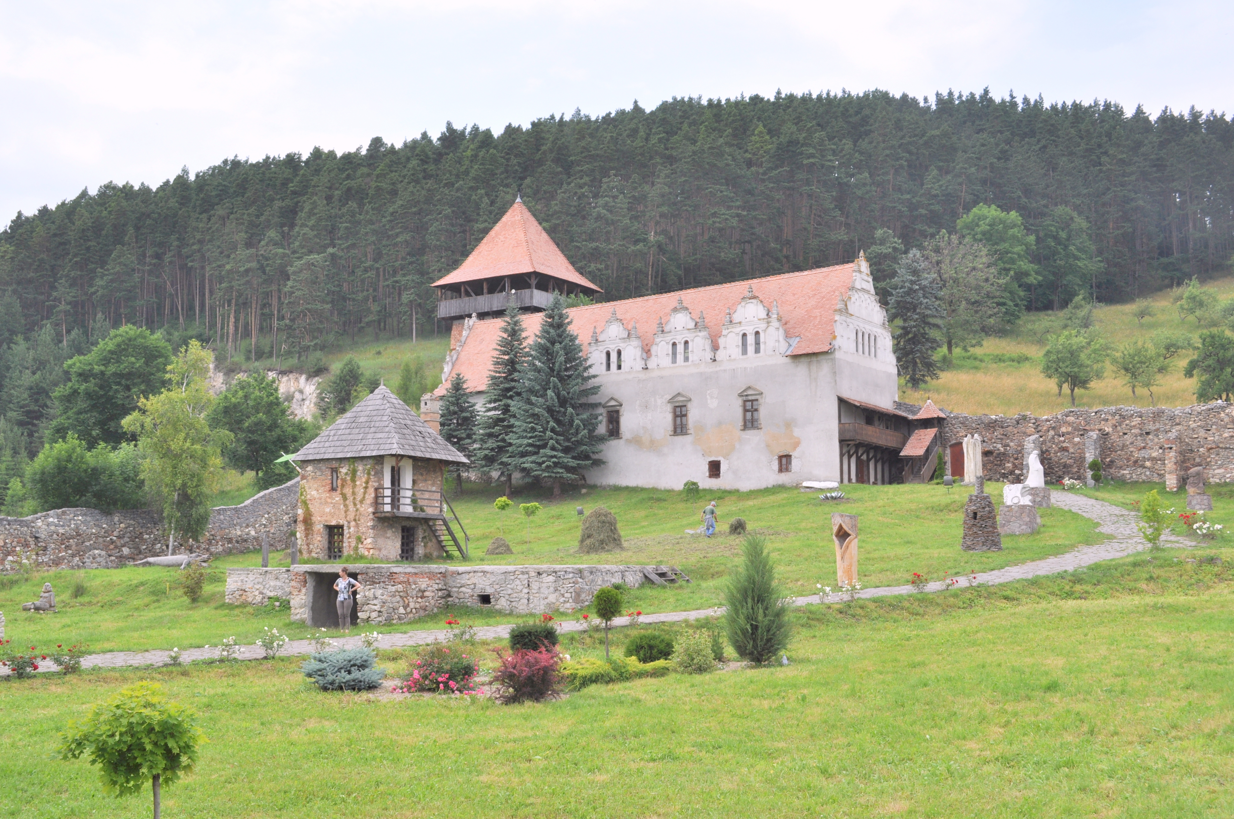 Ansamblul castelului Lázar